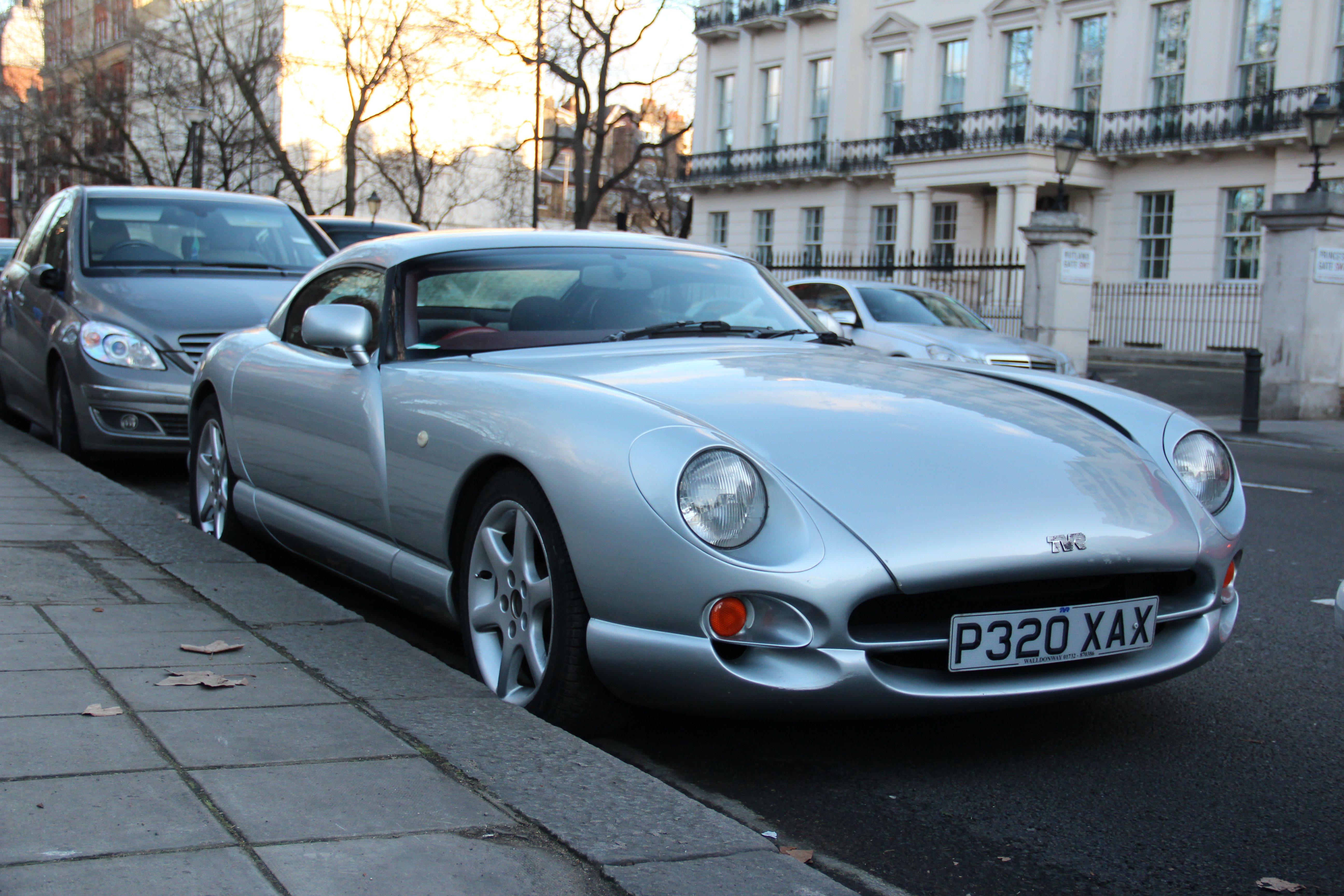 Tvr Cerbera